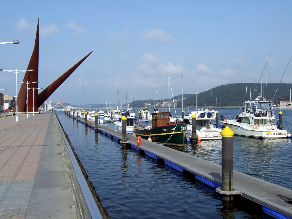 Vista parcial del puerto y la ría de Avilés. En la foto se puede ver el Club Marítimo San Balandrán, situado frente a la dársena de San Agustín, así como la escultura 'Avilés' ubicada en el paseo marítimo de la ría, en la avenida del Conde de Guadalhorce.